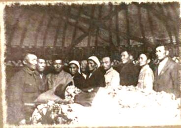 Қазақша (кирил): 1944 жылы 28 мамырда Ш.Берсиев дүниеден озды.